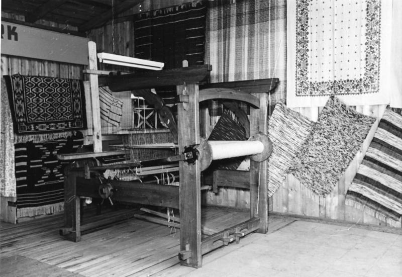 Erste Bundesgartenschau in Hannover Ein Musterwebstuhl liefert seine Erzeugnisse.